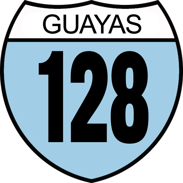 Disco de Identificación Ruta Provincial Guayas 128